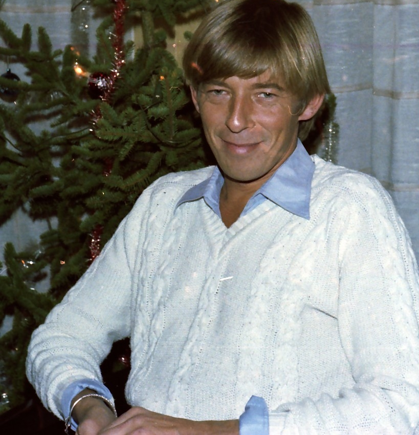 Jukka Kajava, ravintola Bulevardia 10.12.1979